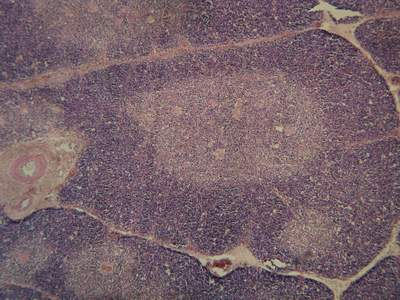 Microscopische foto van de thymus, HE gekleurd. Eigen werk, zelf gemaakt